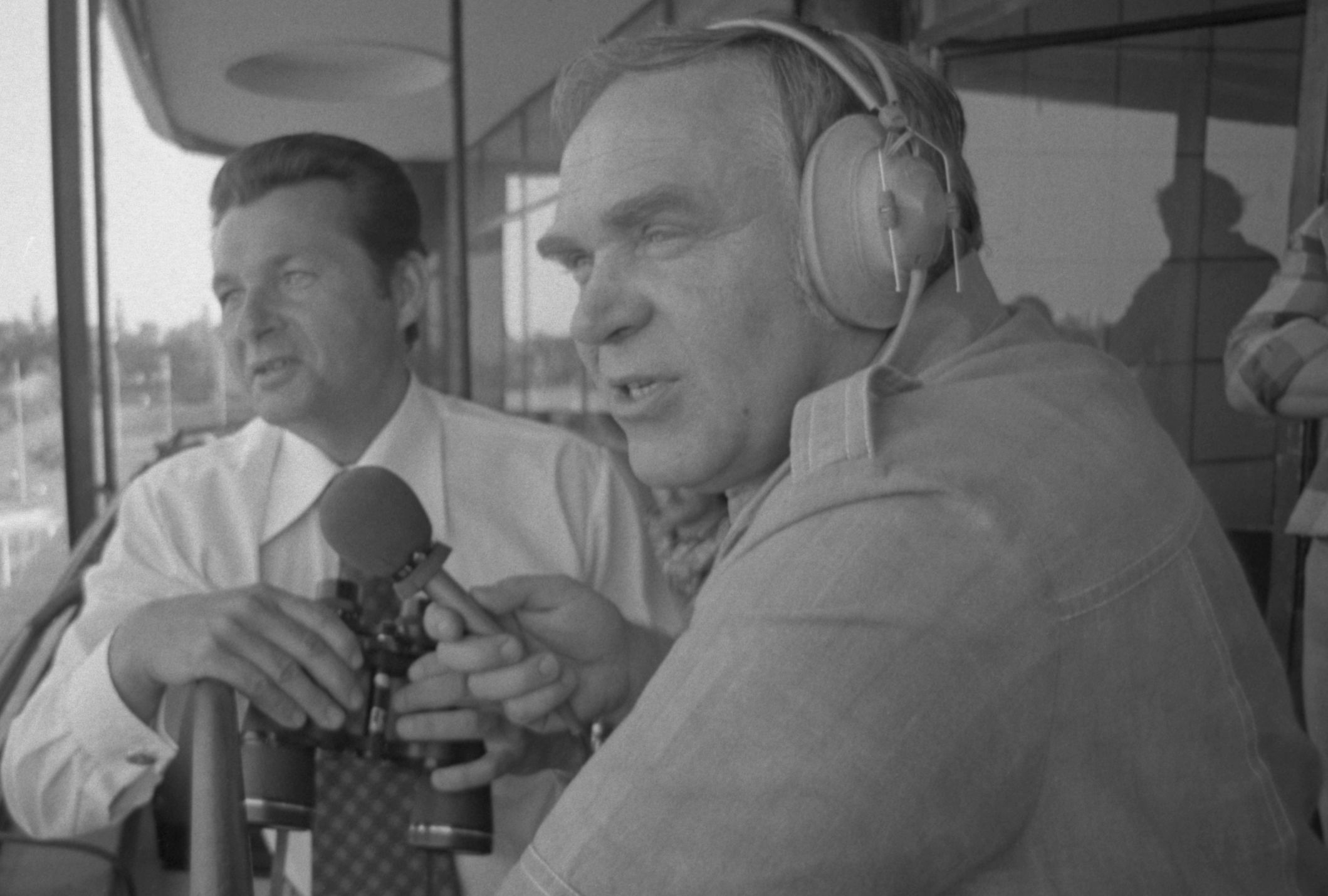 Jan Ciszewski, dziennikarz sportowy.